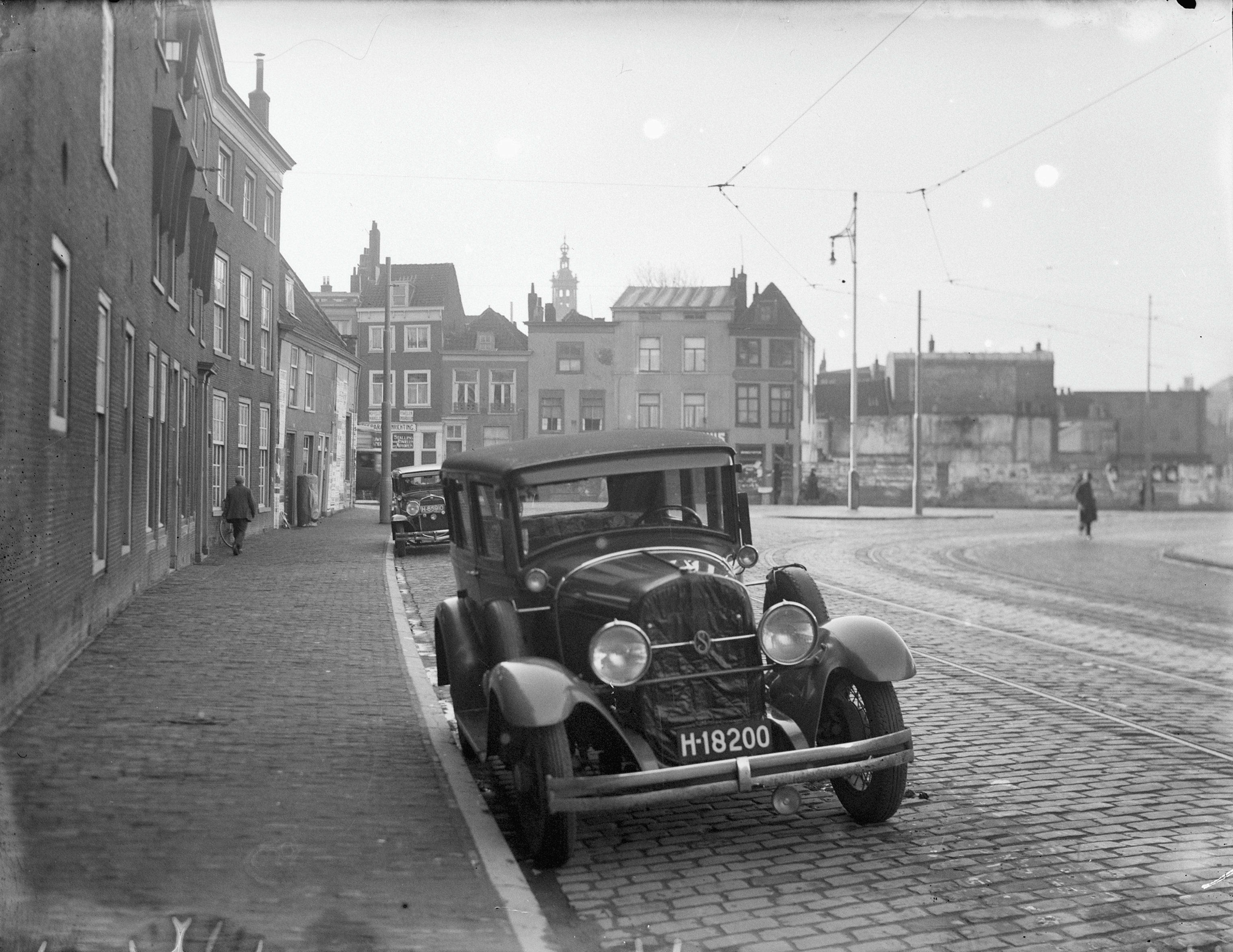 stadsbeeld